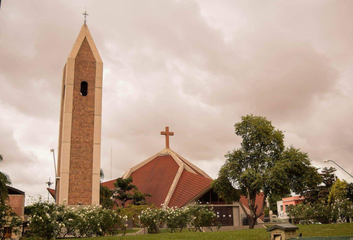 Diócesis de la Nueva Oran